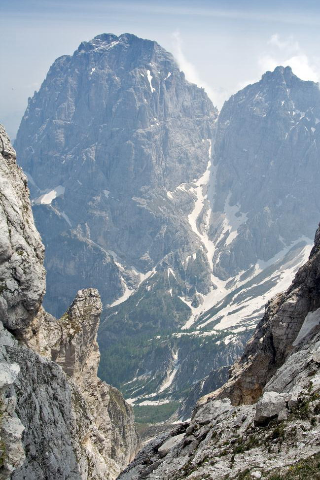 Jof Fuart